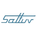 Logo de l'empresa SALTUV